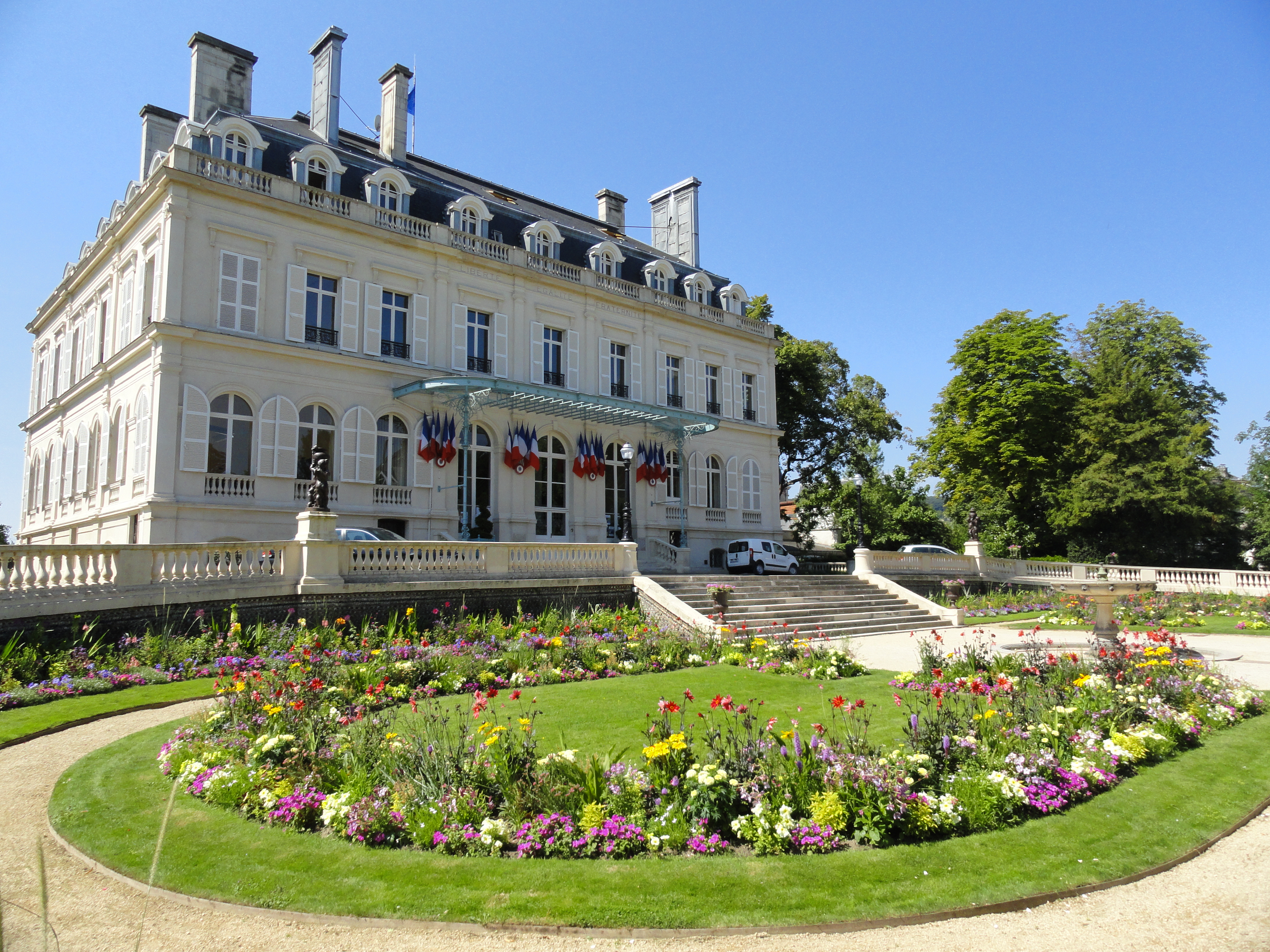 Façade nord de l'Hôtel de Ville d’Épernay, prise depuis son parc